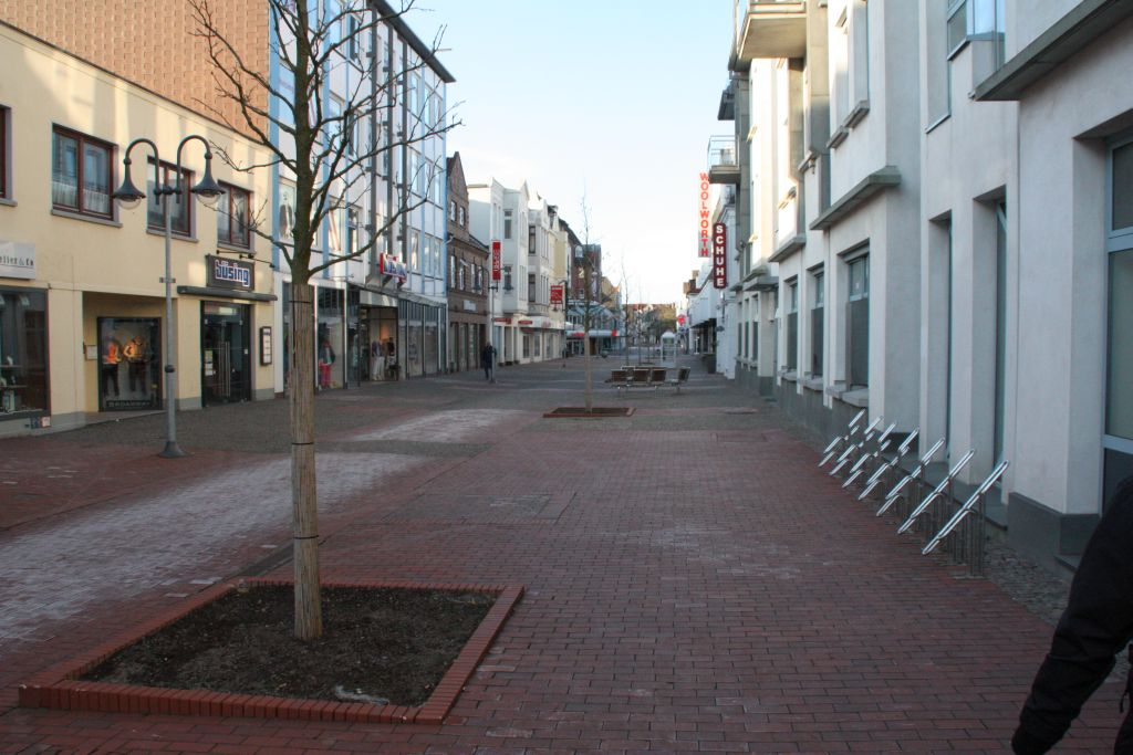 Fußgängerzone Nordenham